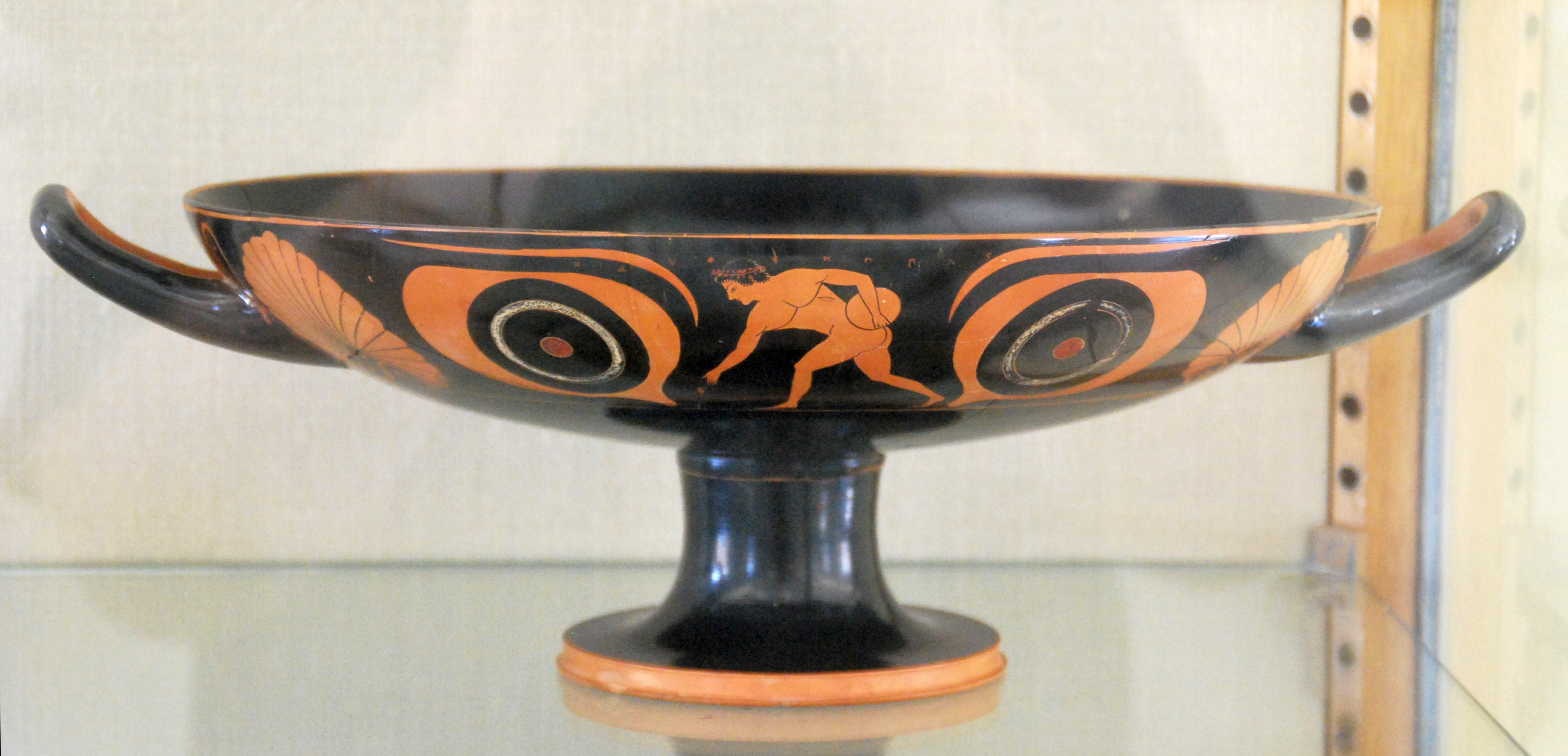 Augenschale. Würzburg, Martin-von-Wagner-Museum L 467. Töpfer: Hischylos, Maler: Pheidippos. ARV² 165 Nr. 2